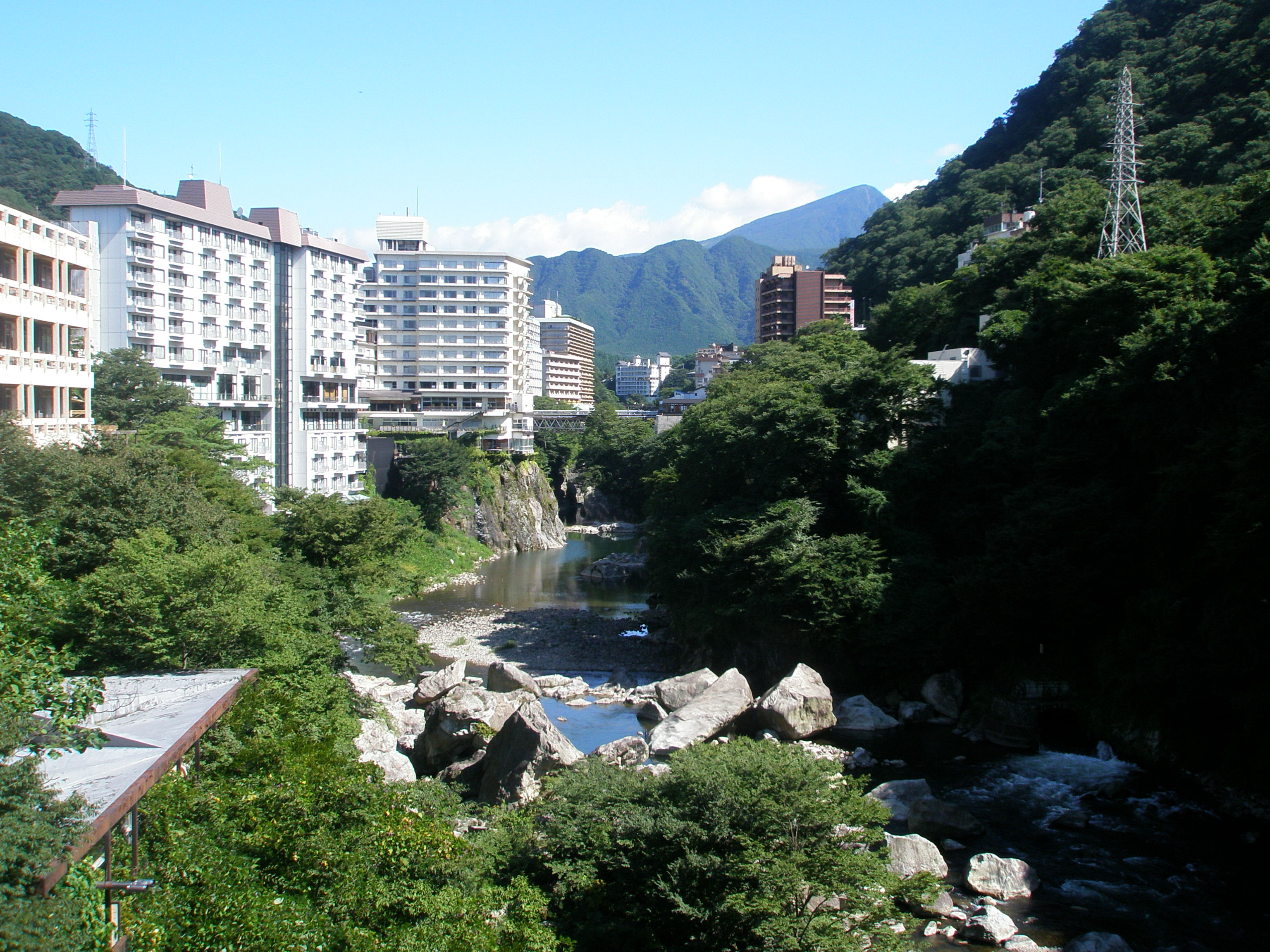 鬼怒川温泉、鬼怒川ふれあい橋より上流方